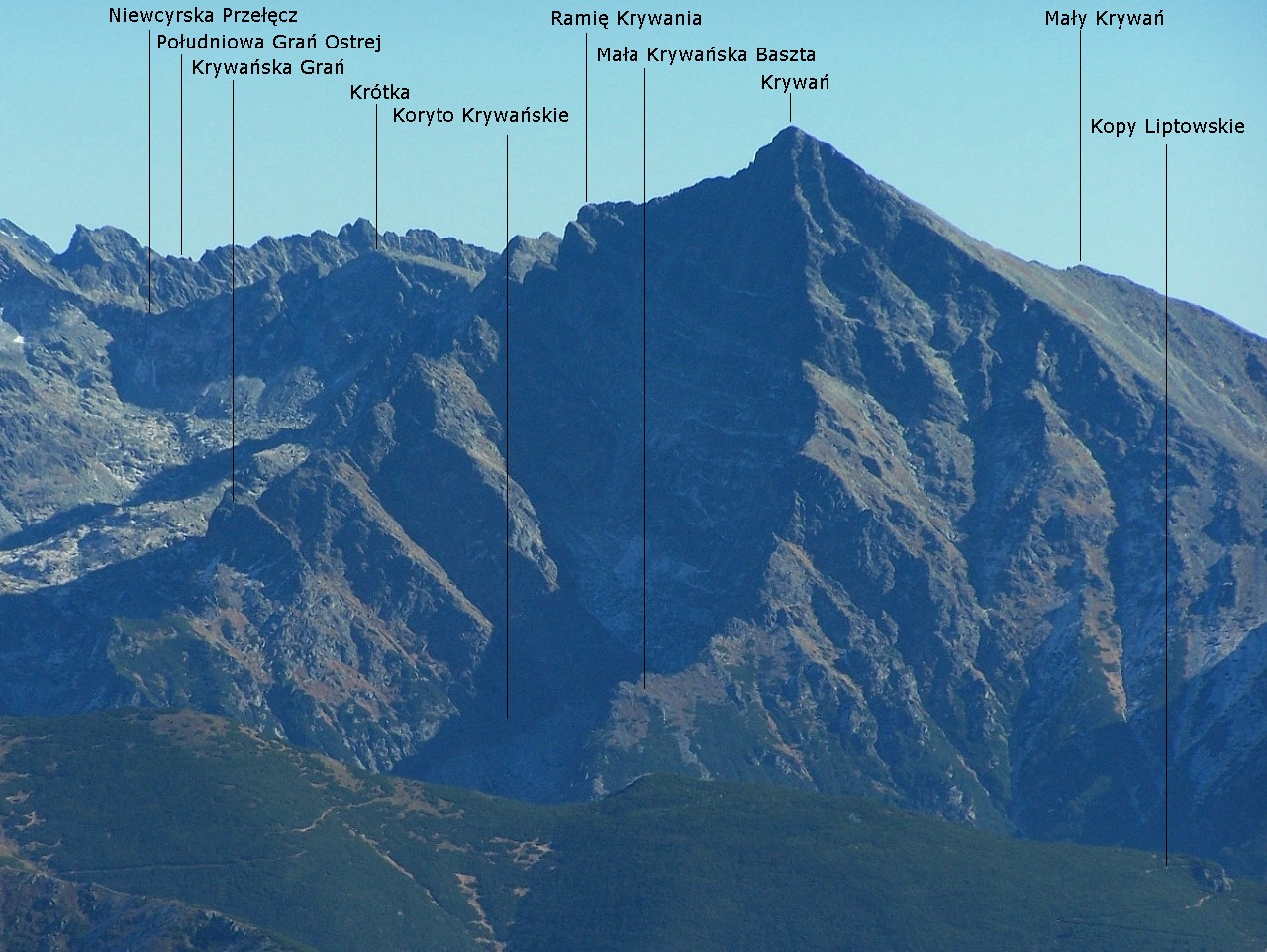 Krywań, widok z Błyszcza